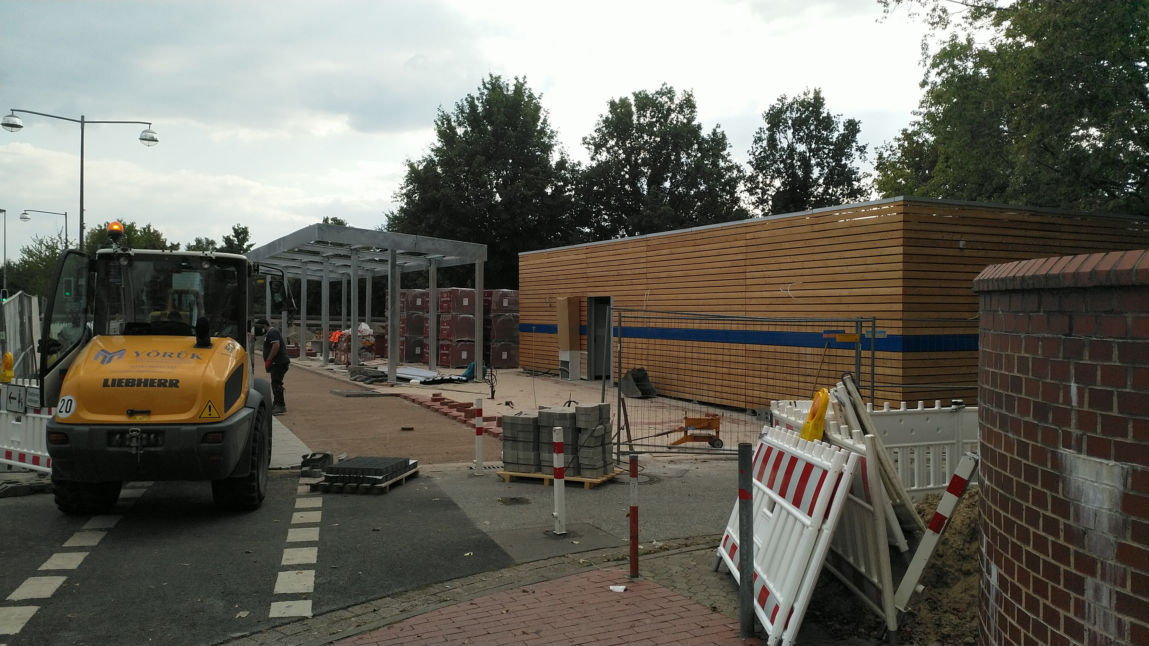 Neue B+R Station in Langenhagen an der Grenze zur Landeshauptstadt Hannover an der Stadtbahnhaltestelle "Berliner Platz". Es werden circa 150 Plätze geschaffen, Fertigstellung 2019